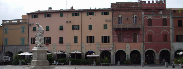 Lato sud di Piazza Dante a Grosseto, Tuscany (Italy)